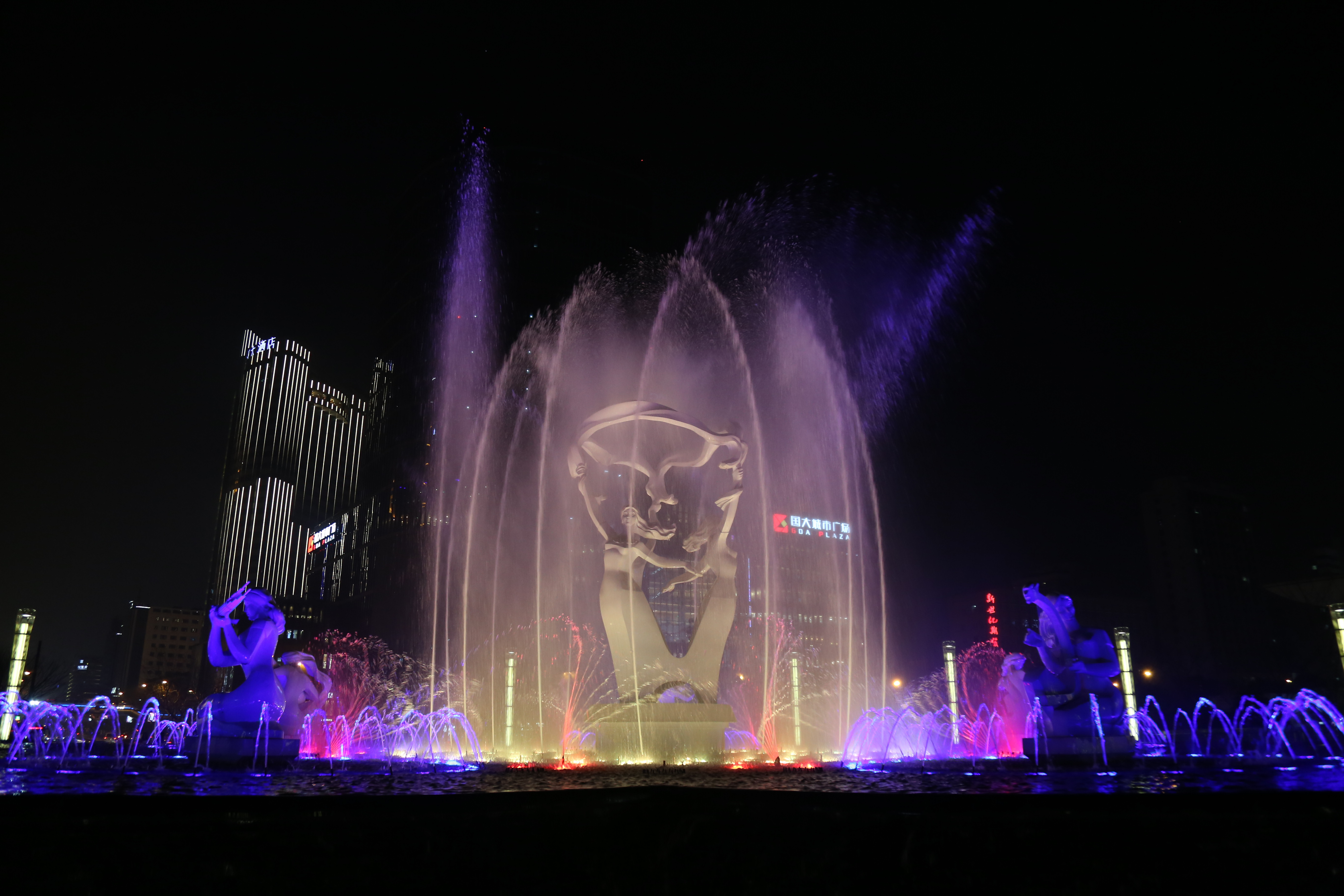 武林广场音乐喷泉表演